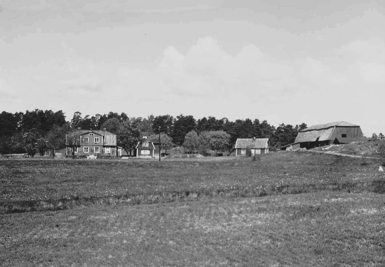 Gården Stensborg i Västberga, vy från Södertäljevägen